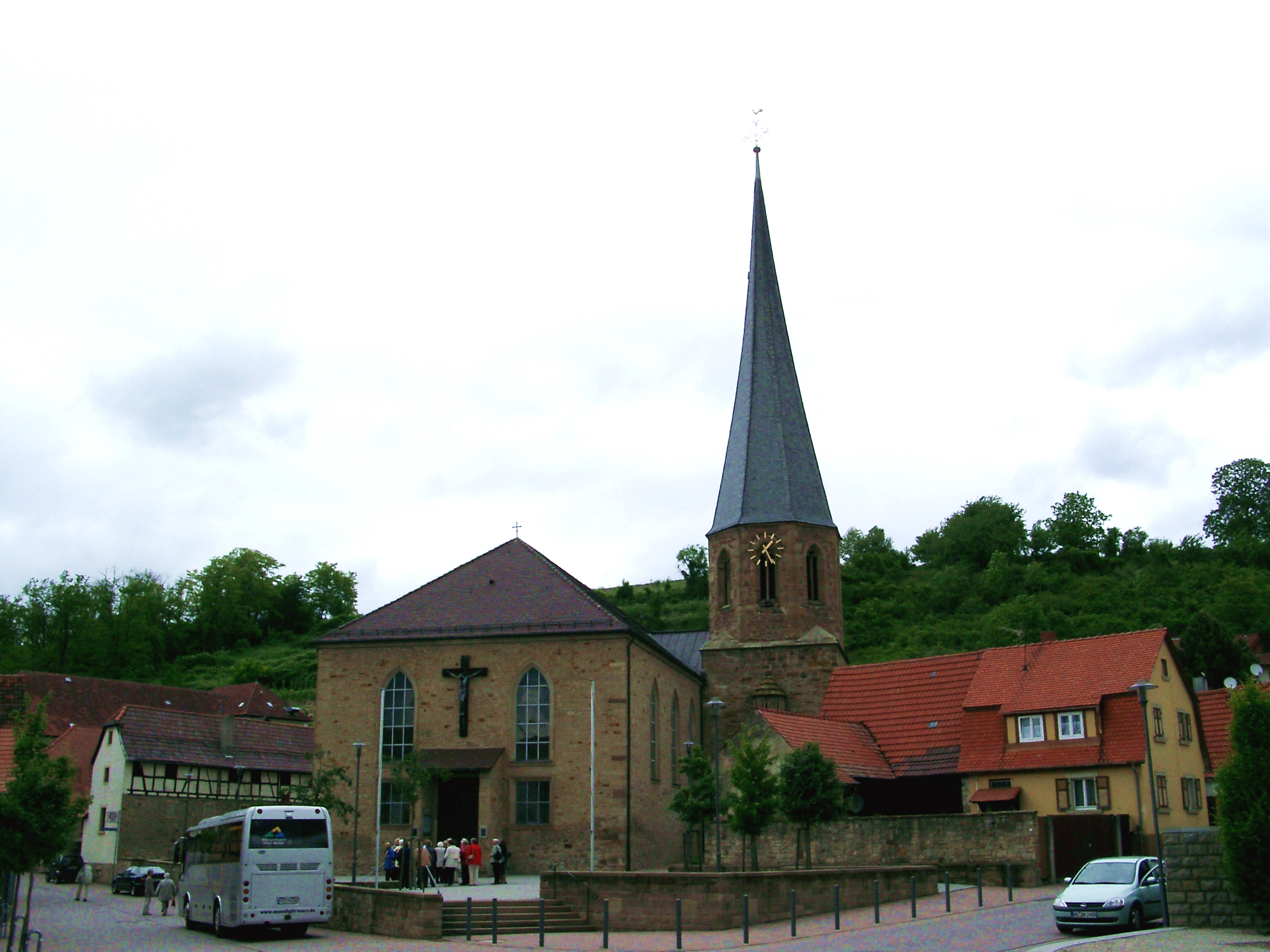 Mühlhausen (Kraichgau), Dorfkirche